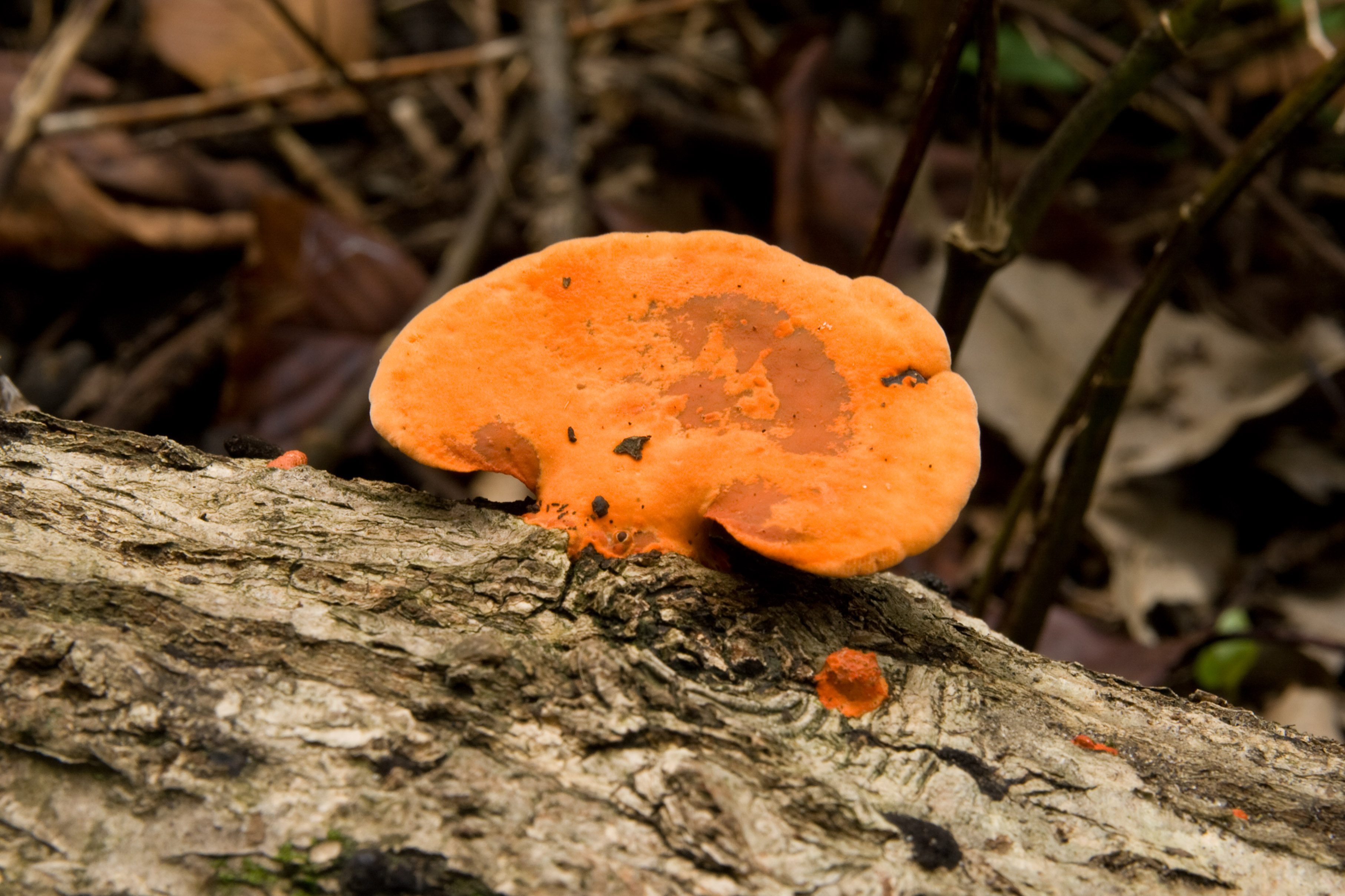 ヒイロタケ (学名:Pycnoporus coccineus)